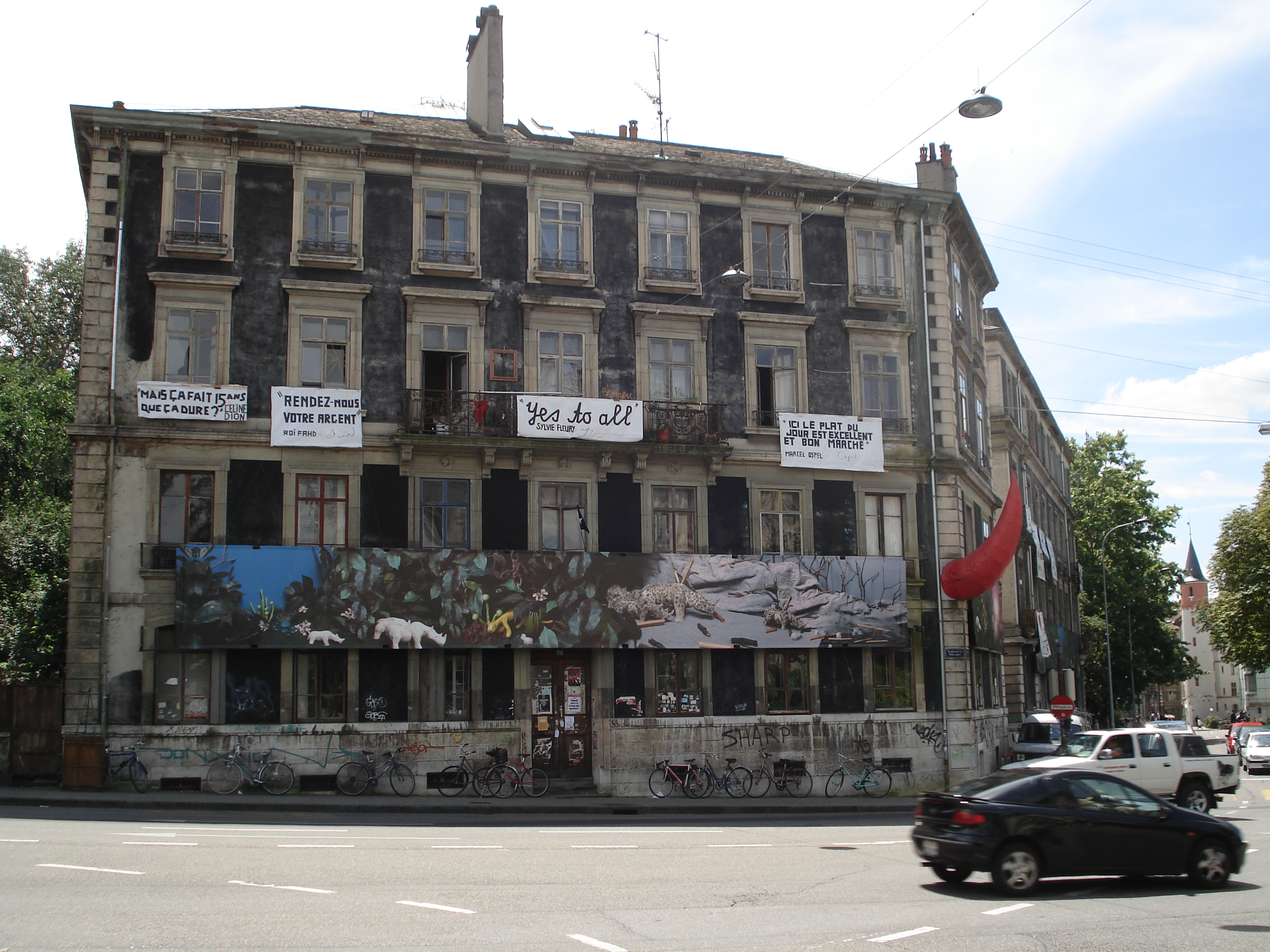 Rhino squat in Geneva